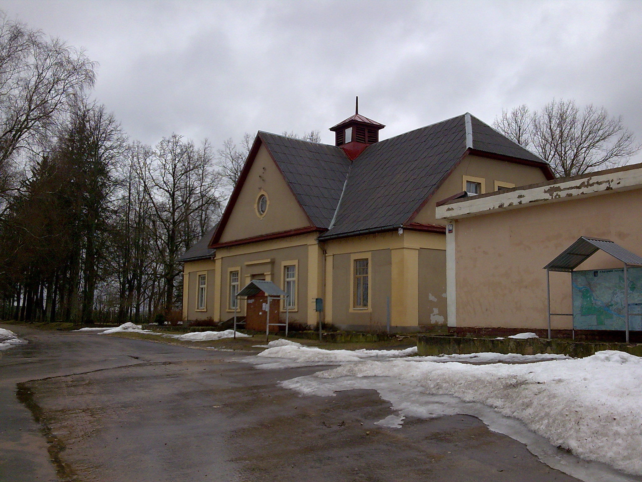 Bijušais Tomes tautas nams